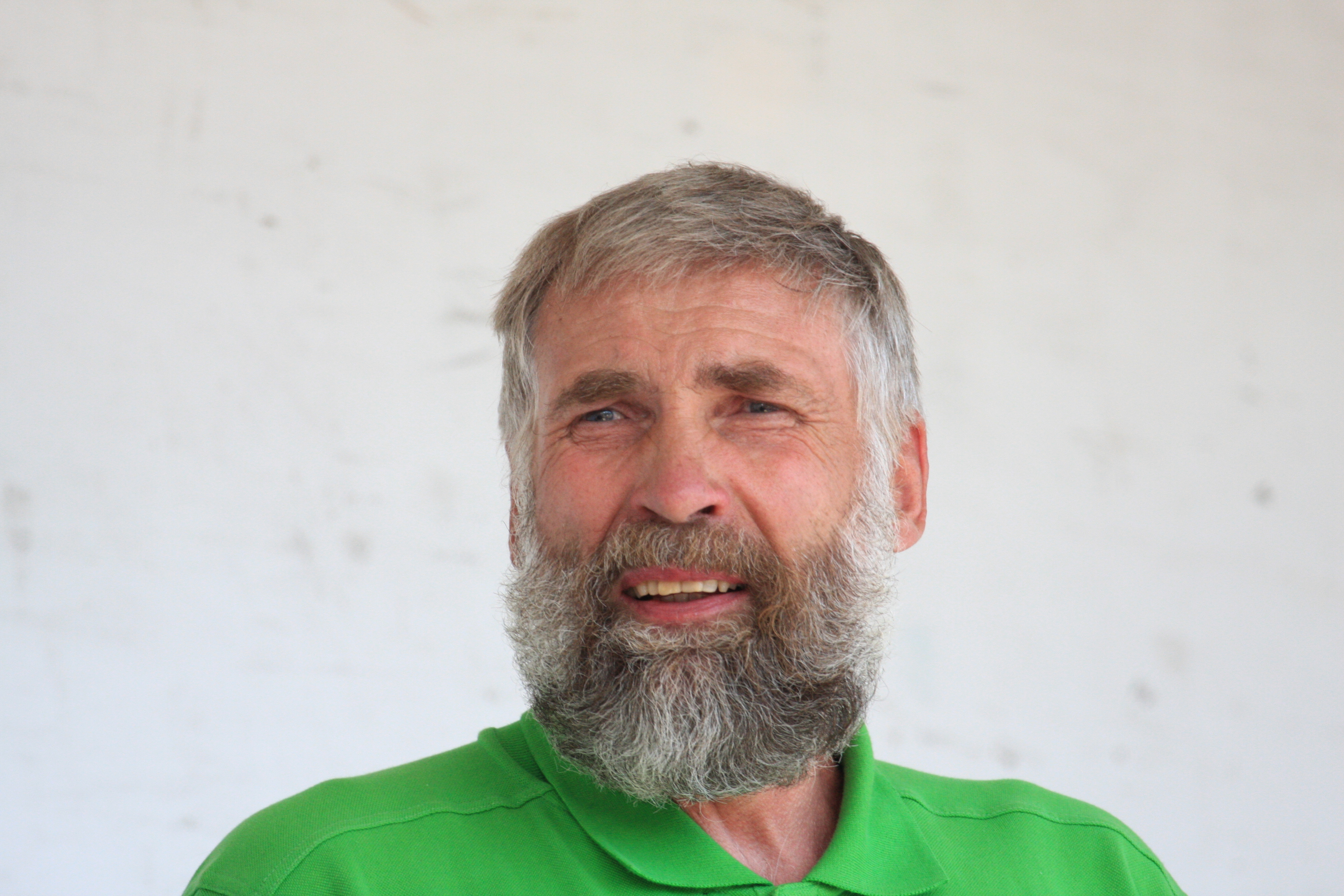 Juha Mieto suomalainen kansanedustaja